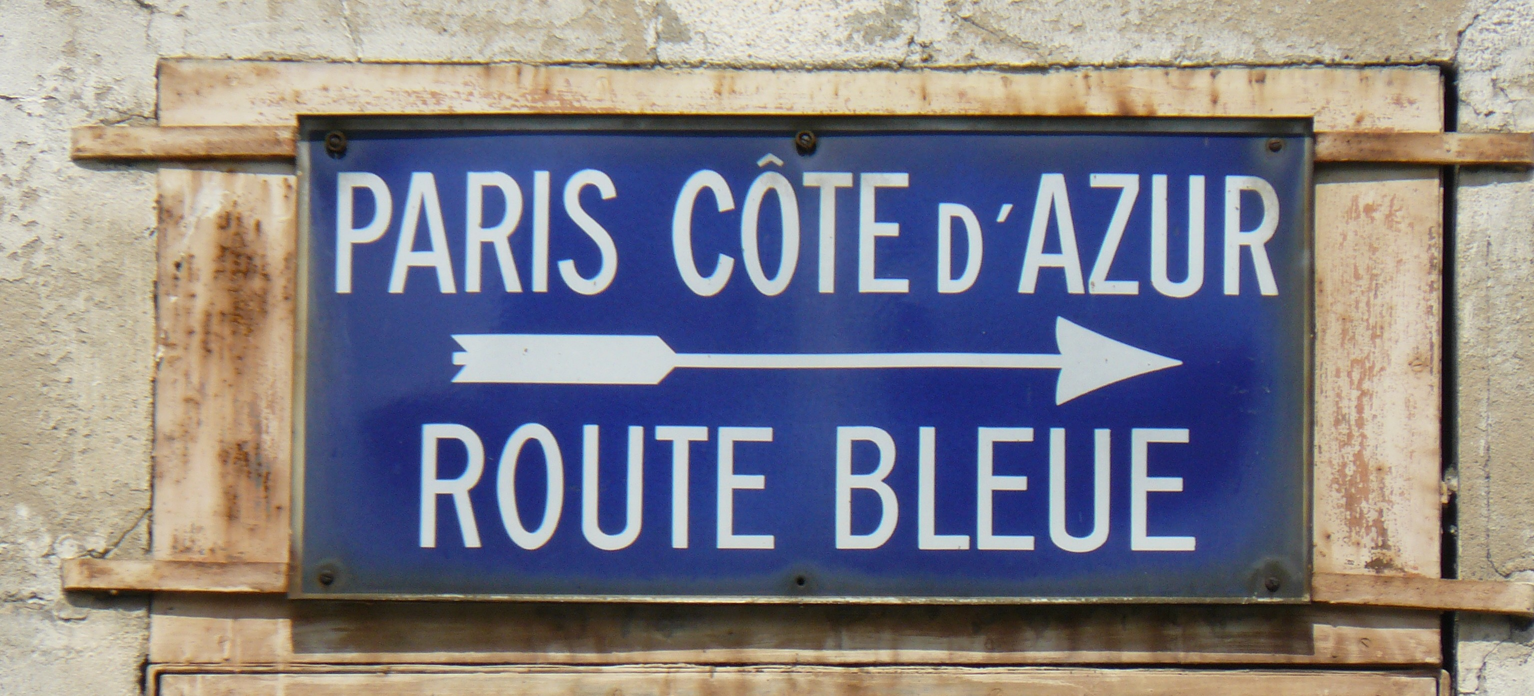 Ancienne plaque "Route Bleue" à Lapalisse (Allier)